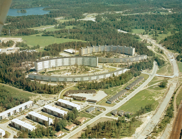 Lädersättraområdet i Kallhäll. Flygfoto från 1968. I förgrunden fr v Sagovägen, Trollvägen, Tomtevägen, Lädersättravägen och Källtorpsleden (senare Kallhällsleden) med järnvägen längst t h. I bildens mitt Legendvägen, Fabelvägen och Askungevägen. I bakgrunden fr v Översjön, Enköpingsvägen med korsningen Enköpingsvägen-Kallhällsleden-E 18-uppfarten under byggnad. T h framför skogen utmed Kallhällsleden (under byggnad) ligger torpet Lilla Kärrboda